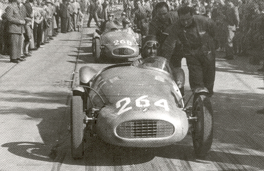 Bandini 750 sport siluro/massimo bondi e ilario bandini